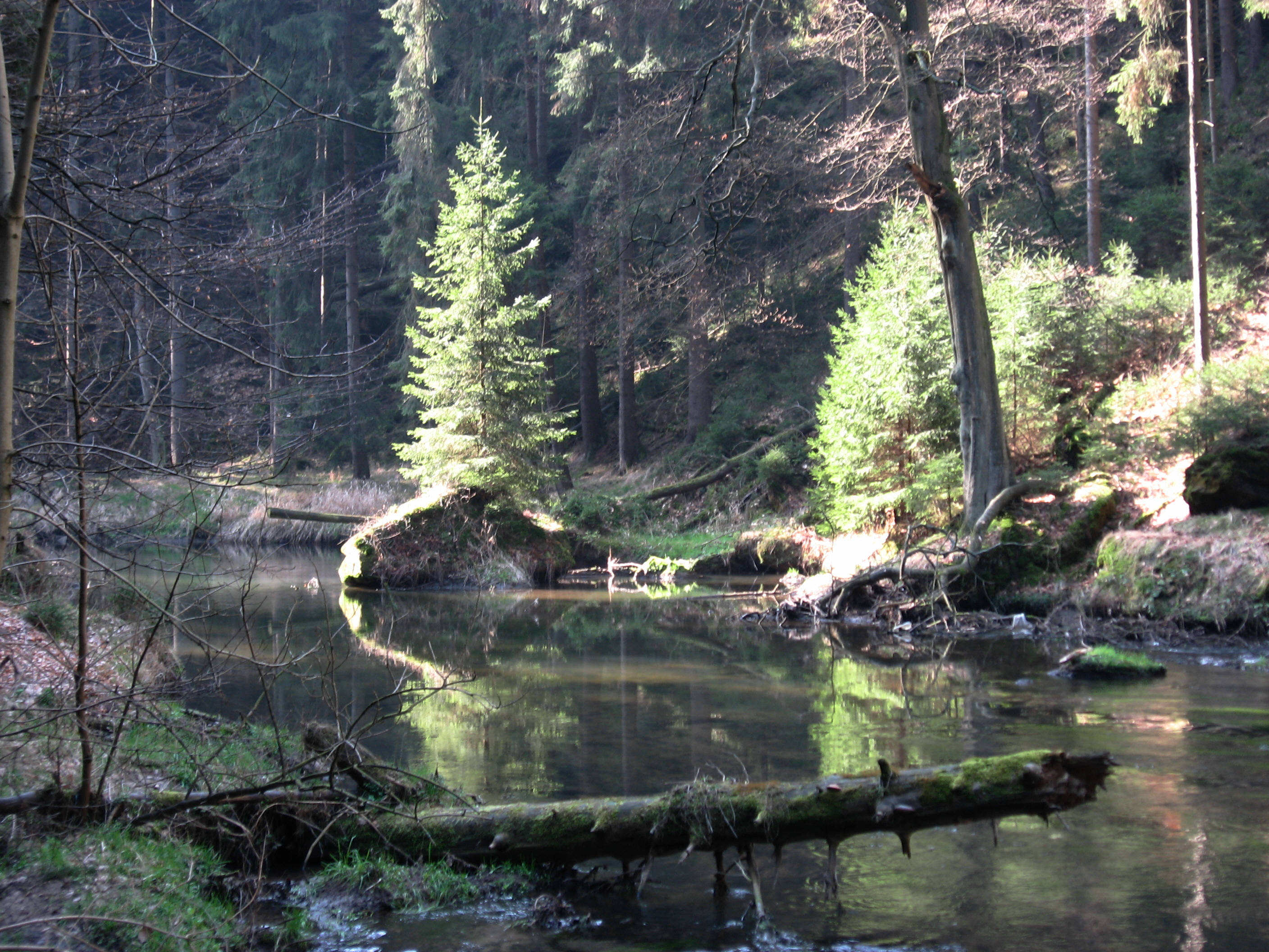 Kamenice_bei_Dolsky_Mlyn